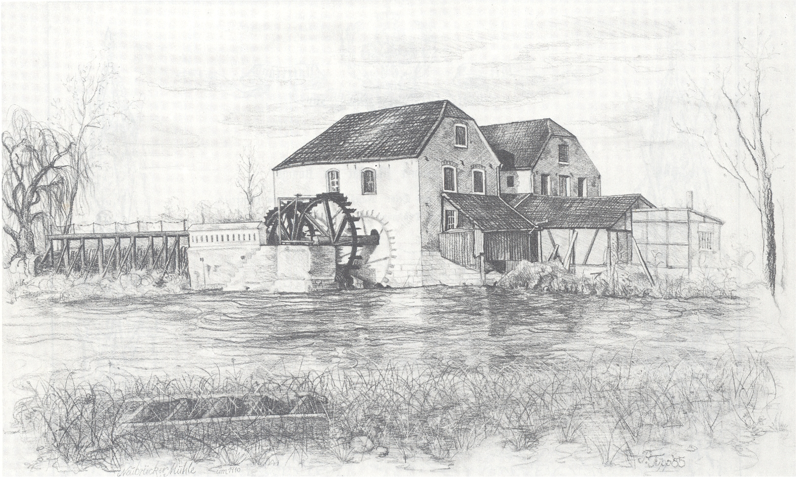 Die Neubrücker Mühle im Jahr 1930